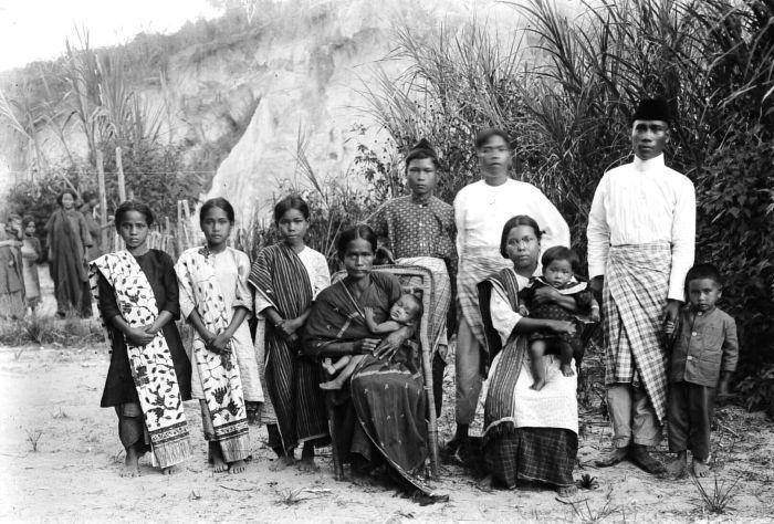 Negatief. Res. Tapanoeli. Toba-Bataksche familie tot het Christendom bekeerd.